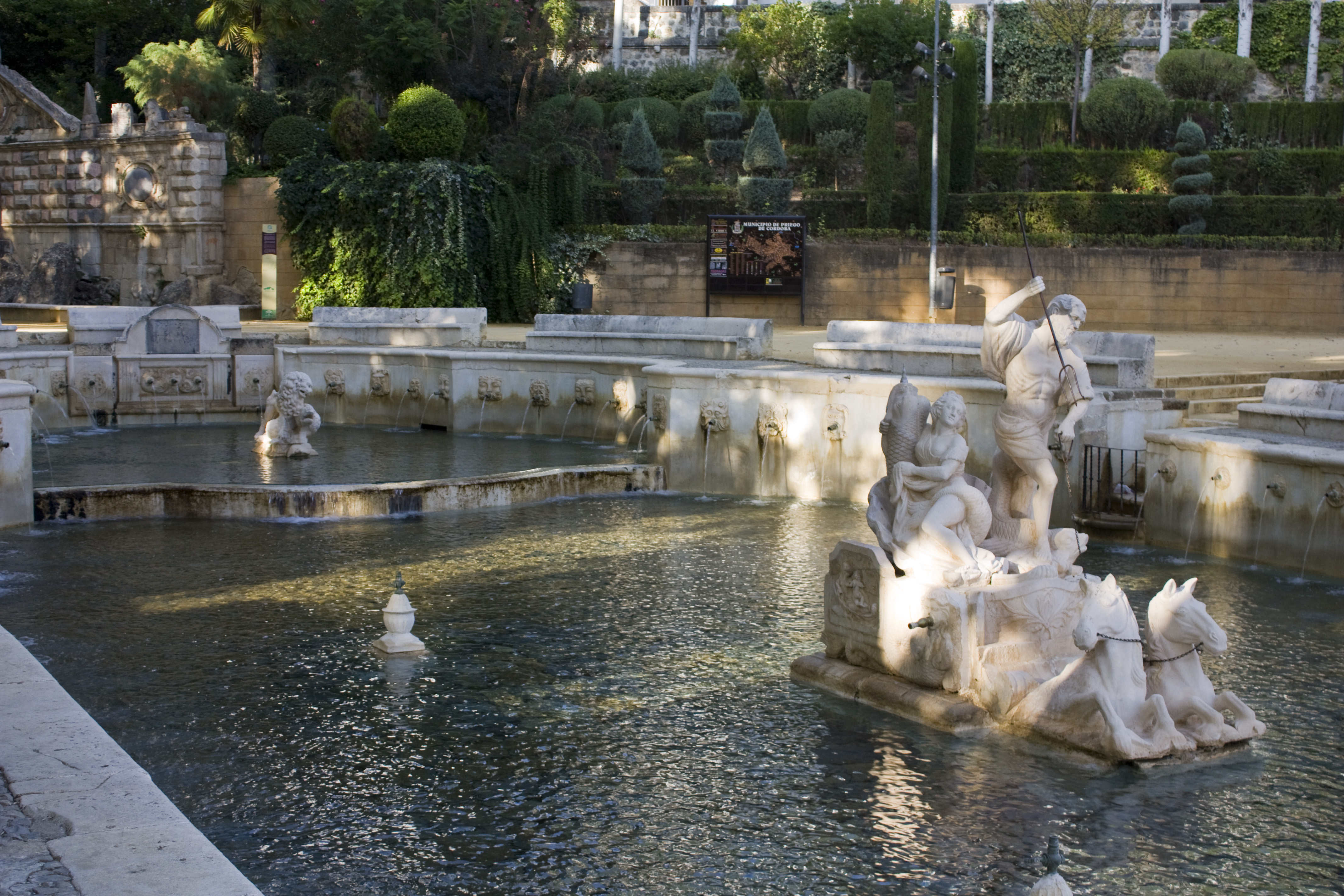 Bassin de Neptune.